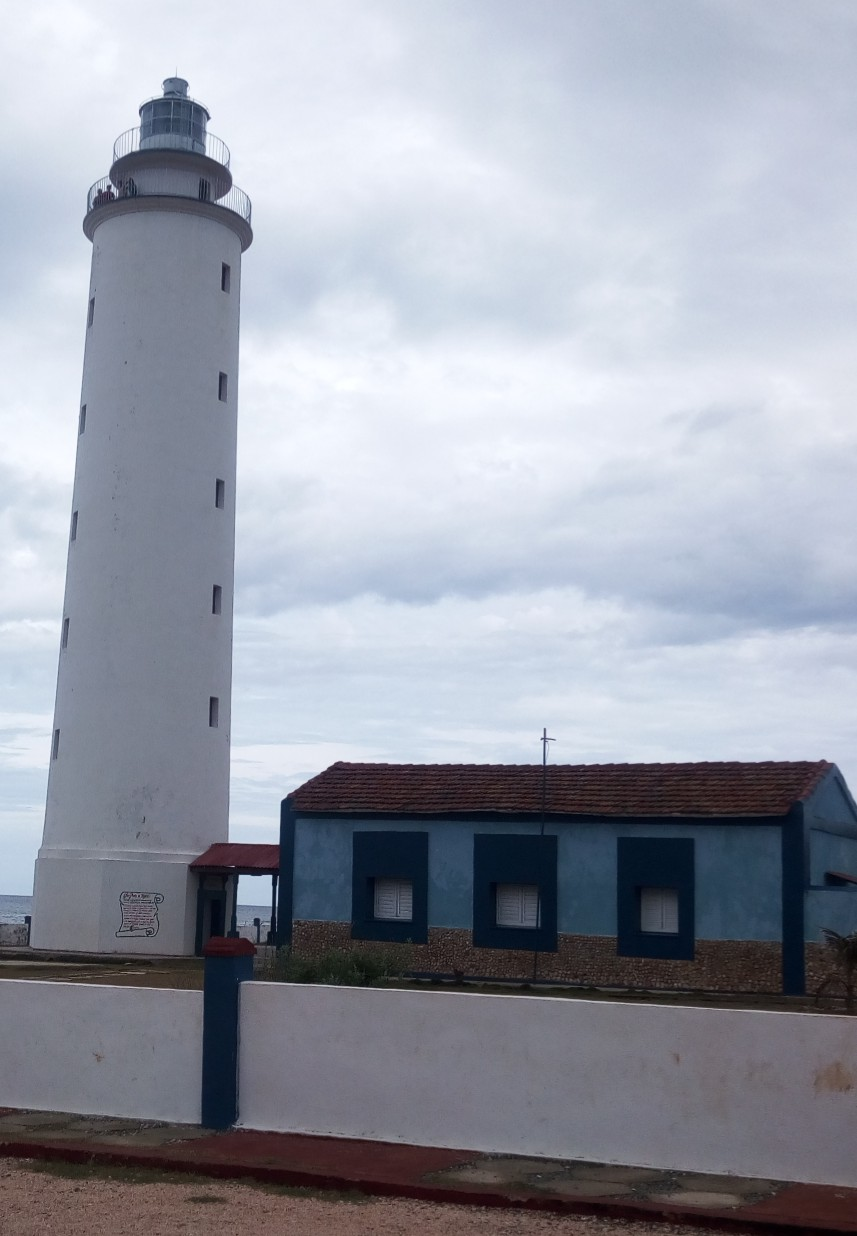 Punta de Maisí: el faro.